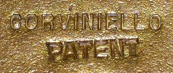 Corvinello Patent